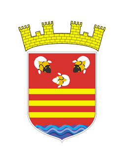 Escudo de Briviesca (Burgos, España)